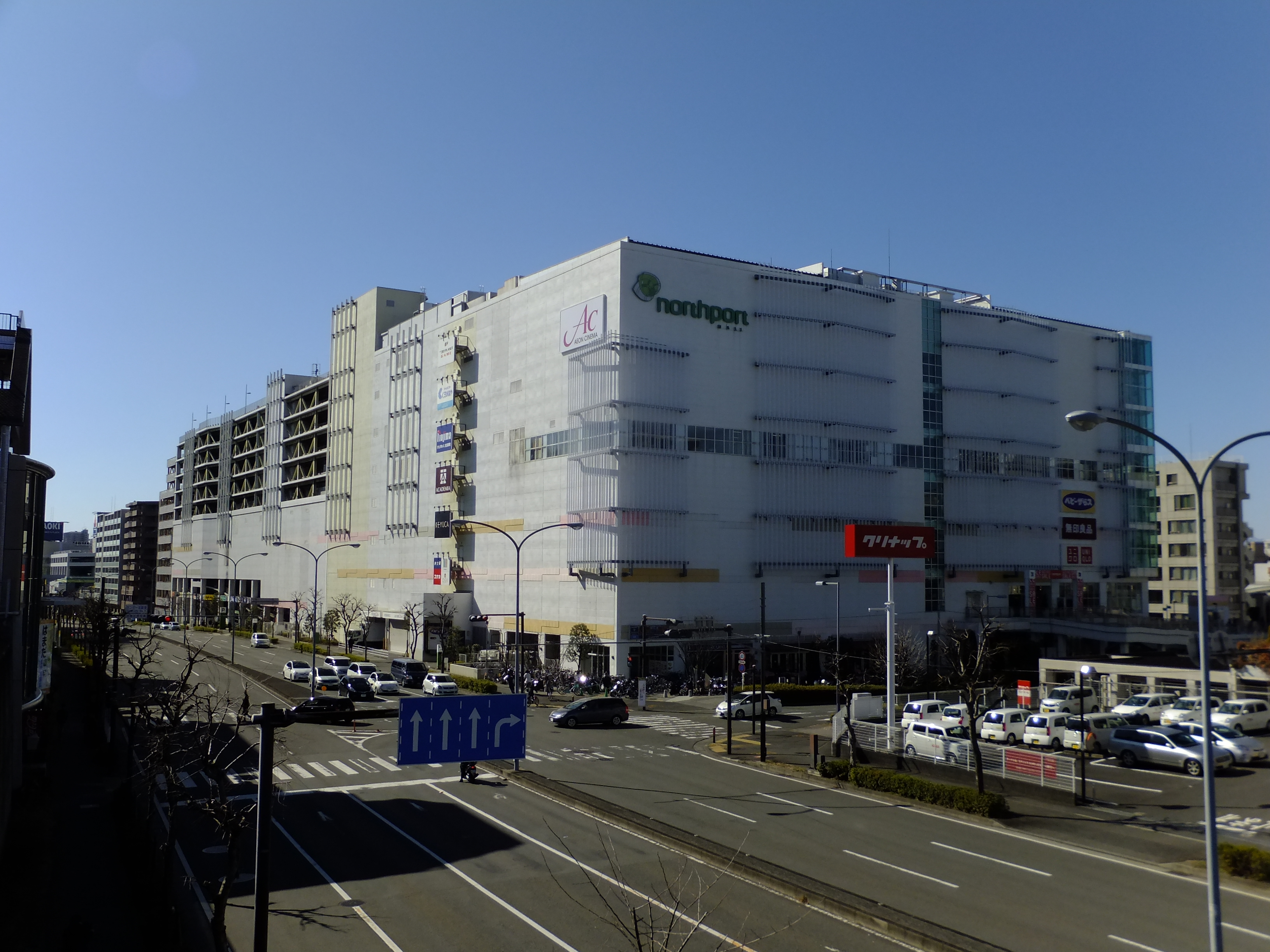 港北ニュータウンの大型商業施設、ノースポート・モール